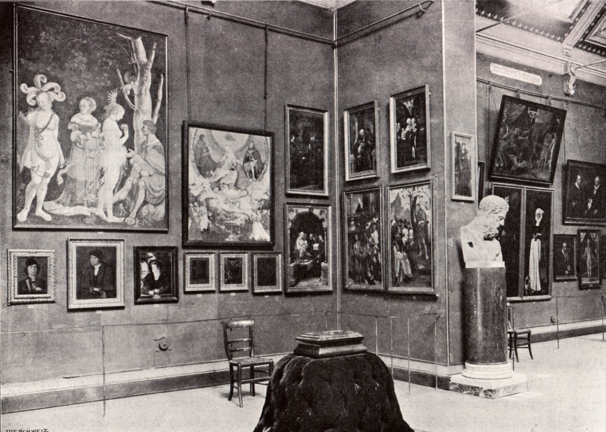 Galerie der alten Meister in der Öffentlichen Basler Kunstsammlung